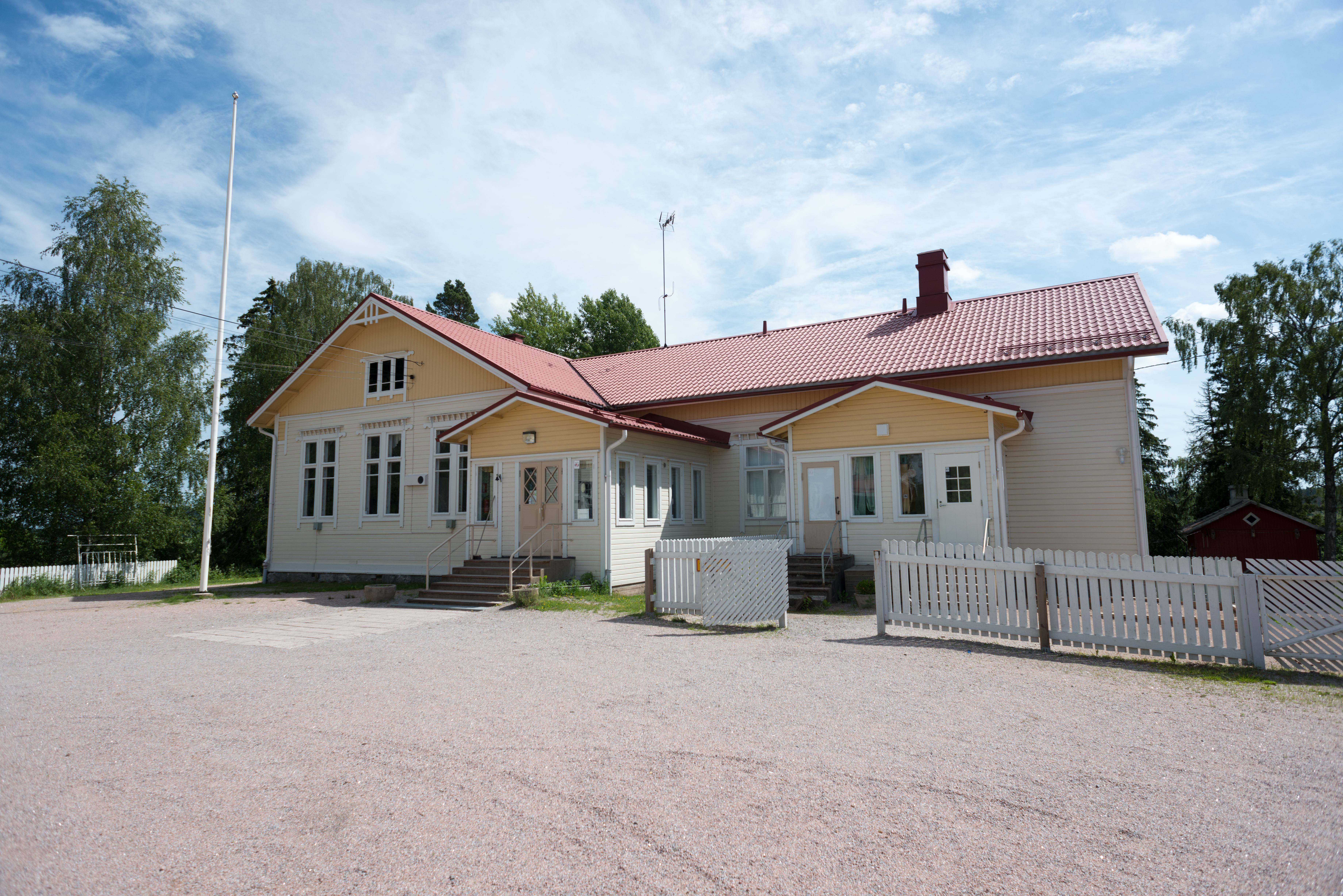 Hajalan koulu Salossa